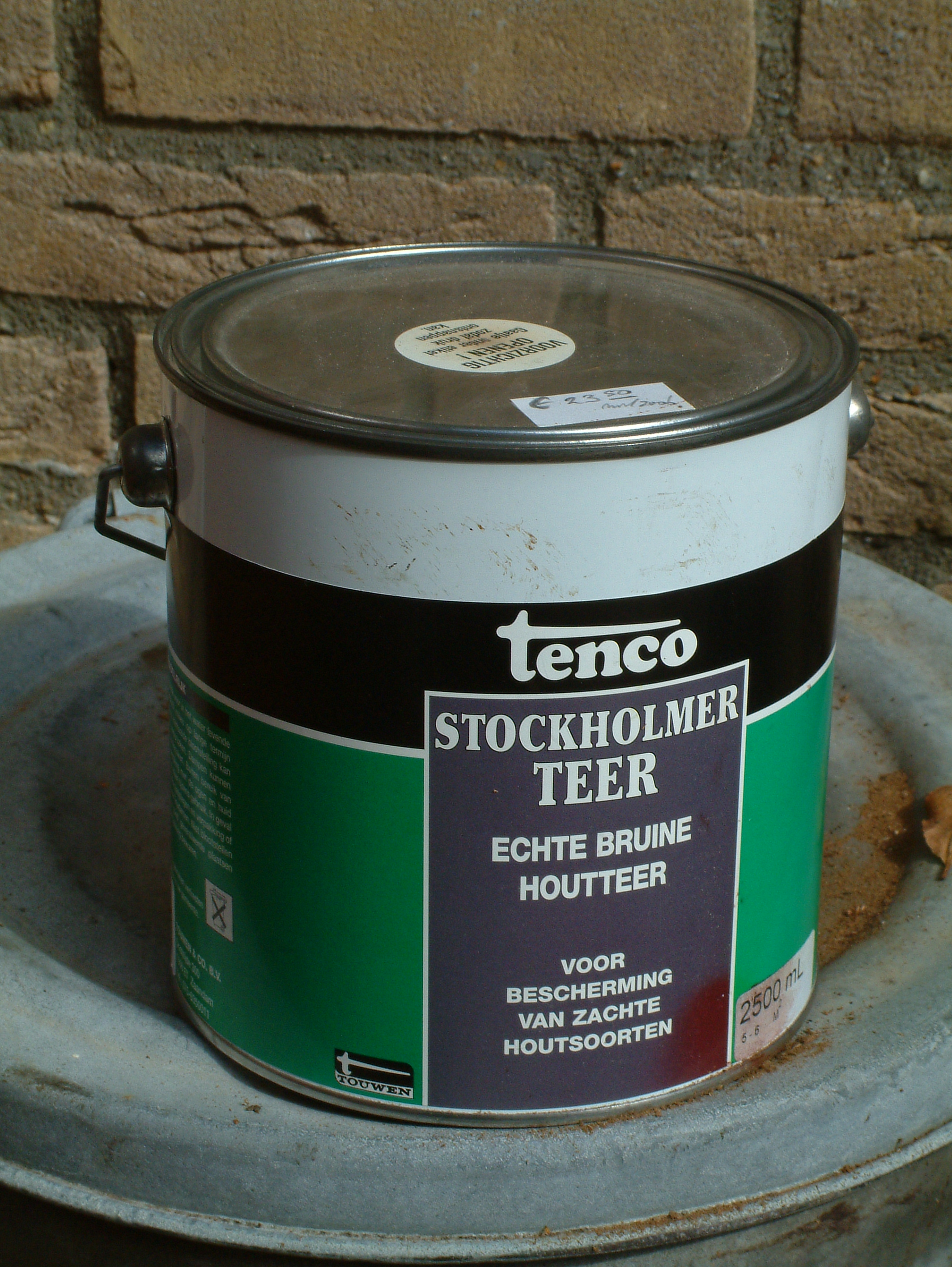 Nieuwe bus bruine teer